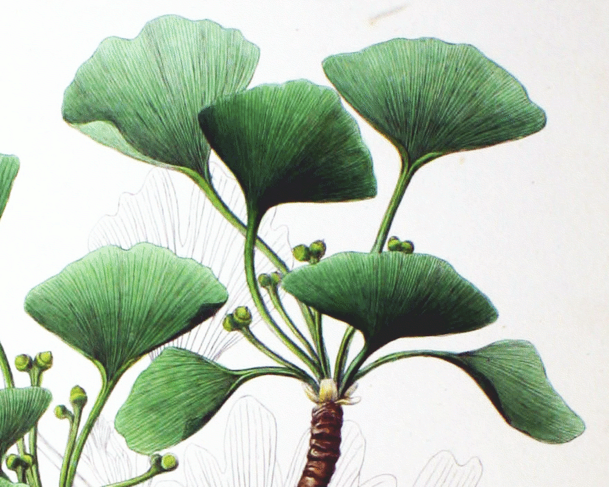 Weiblicher Blütenstand eines Ginkgo biloba